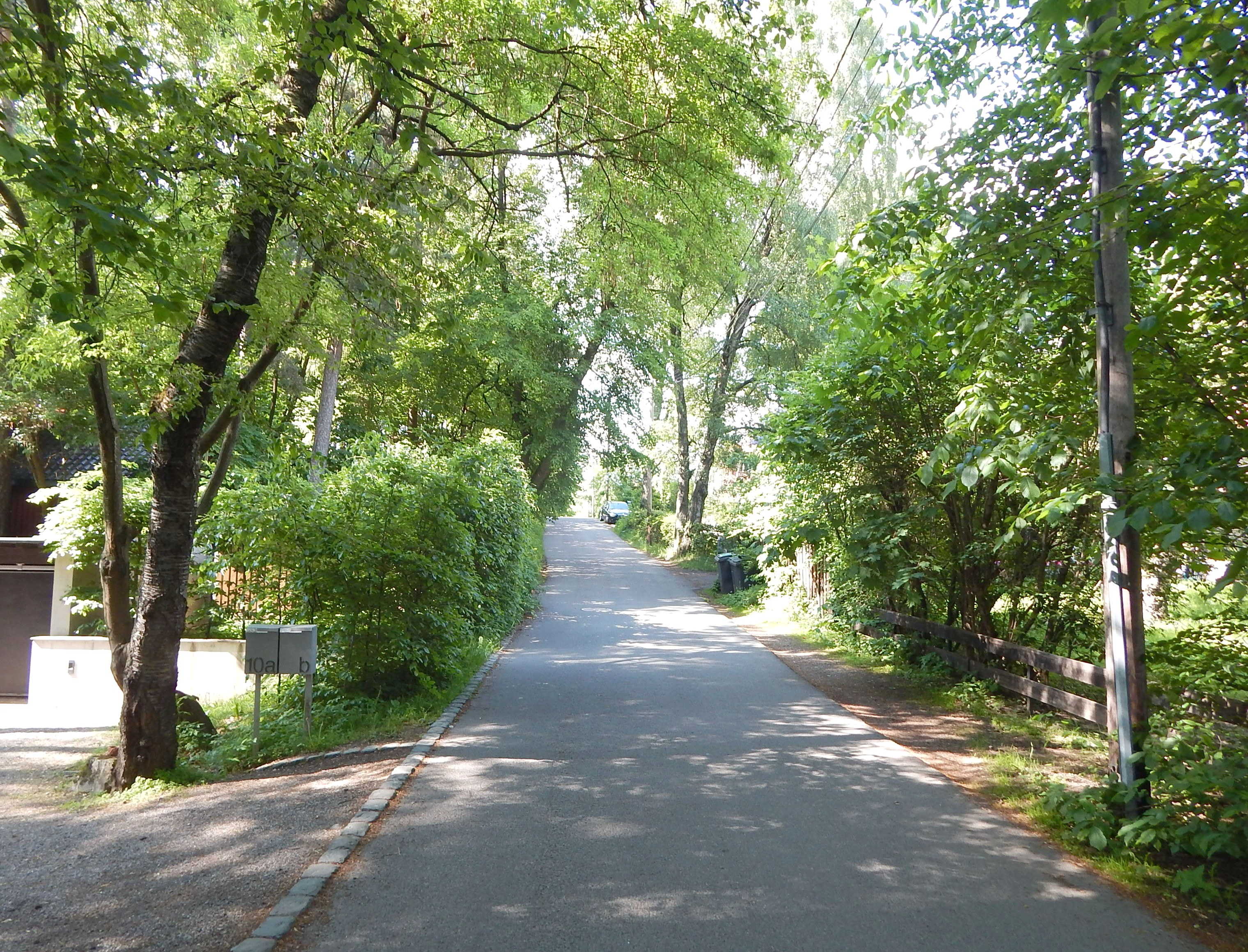 Tyribakken